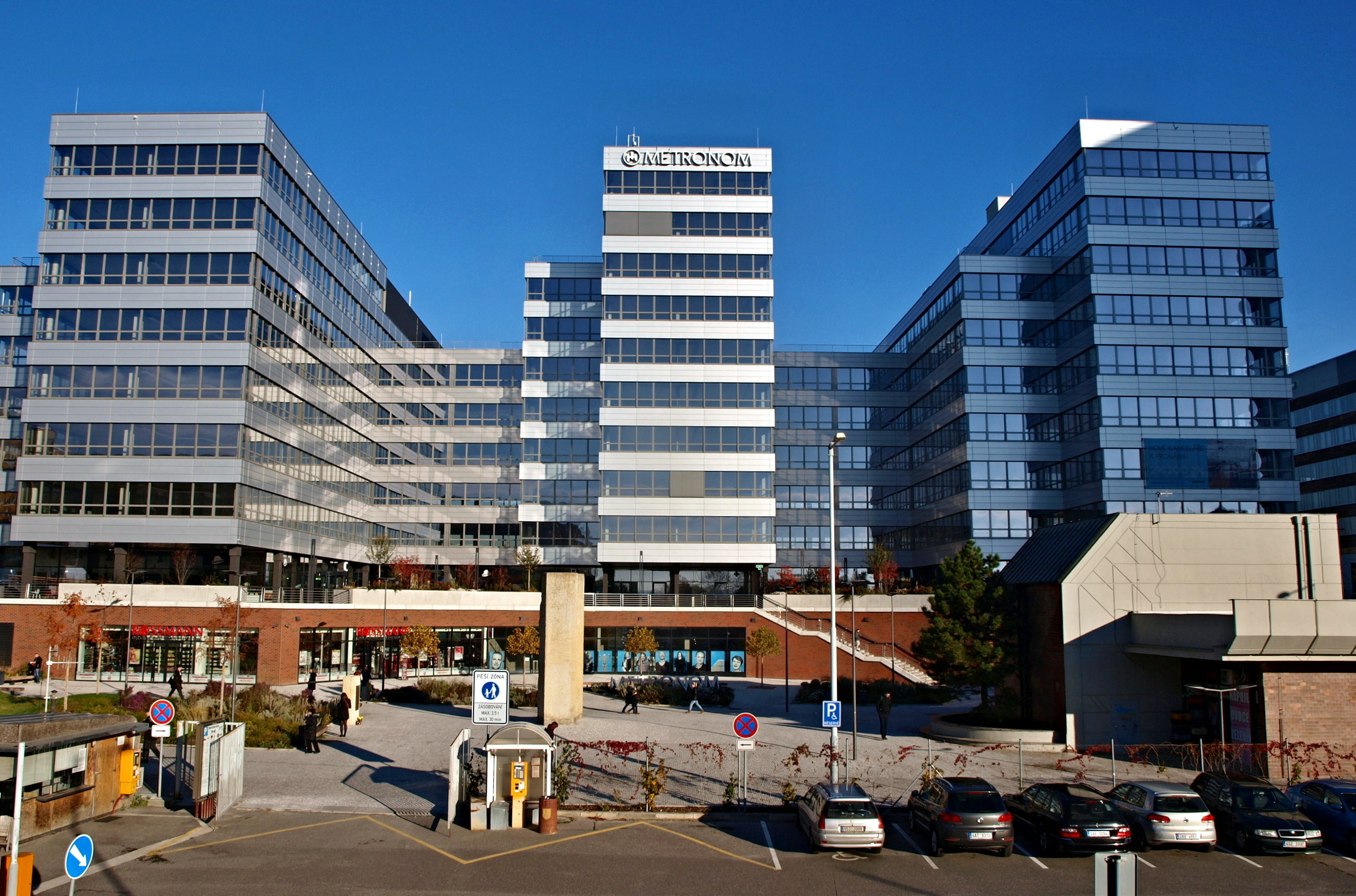 Nové Butovice, budova Metronom